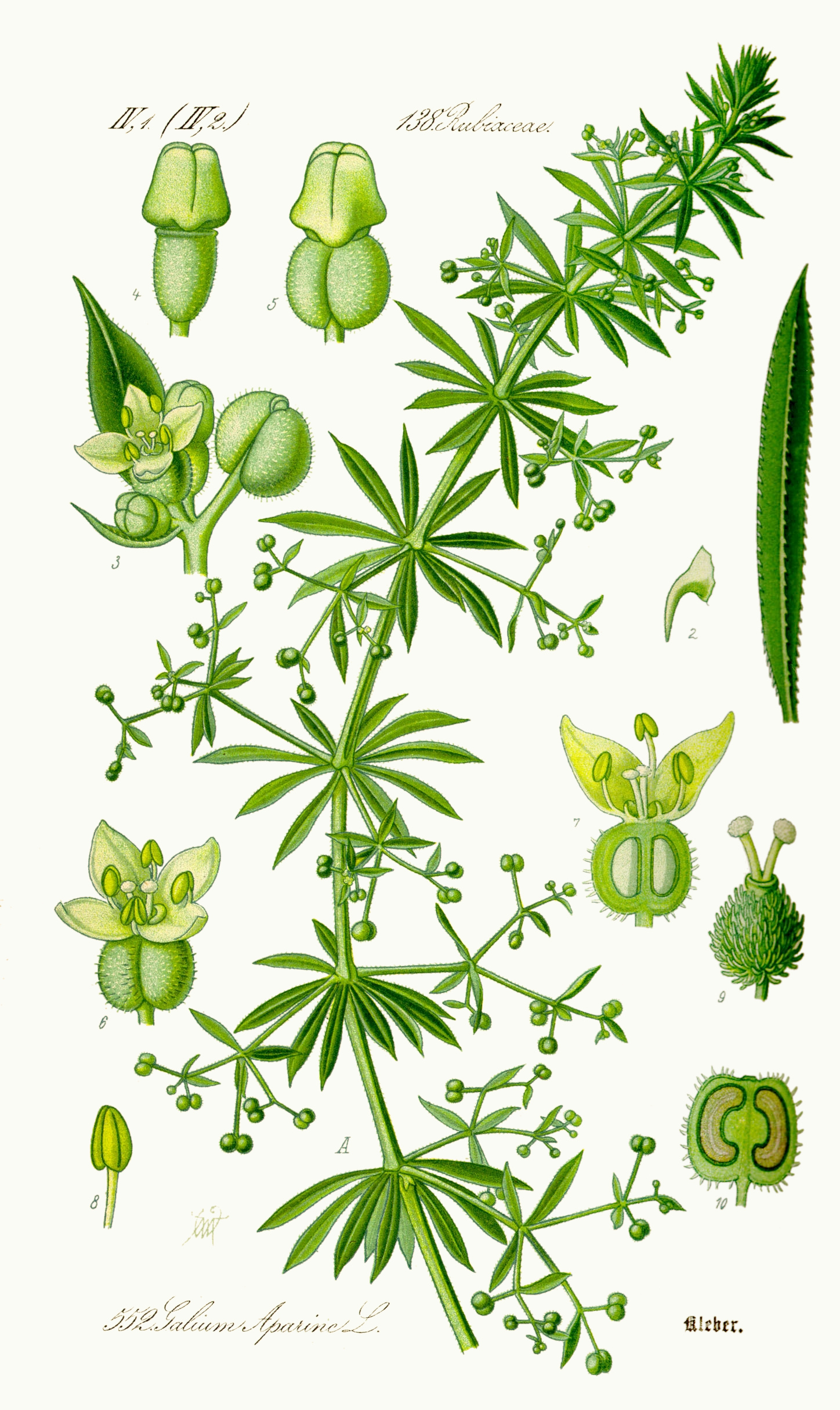 Galium aparine